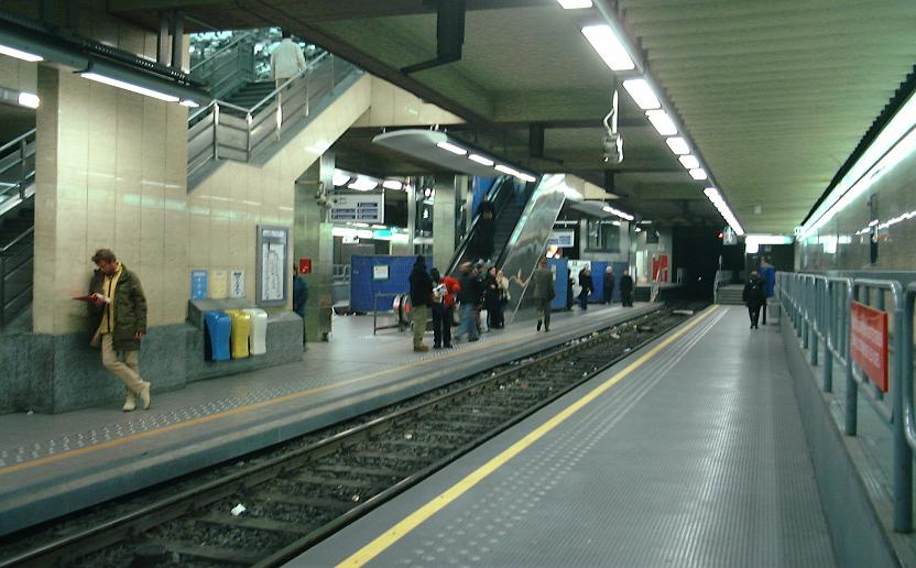 Perrons van de noord-zuidas van de Brusselse premetro in het station Rogier